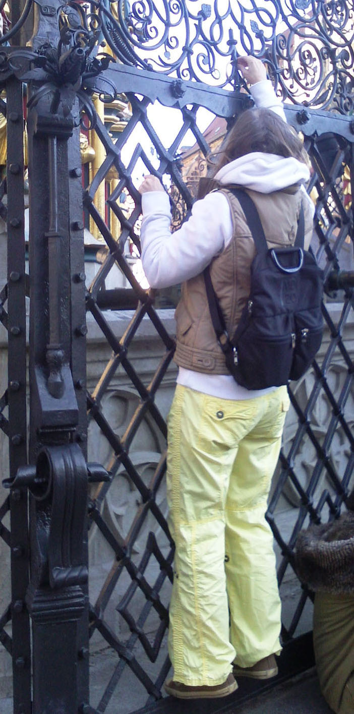 Schöner Brunnen - Dame beim Drehen des ´Glücksringes´